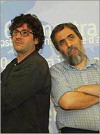 foto dei due registi sul set di totò che visse due volte